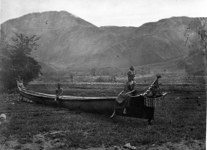 Foto. Een Toba Batak prauw met houtsnijwerk op de voorsteven